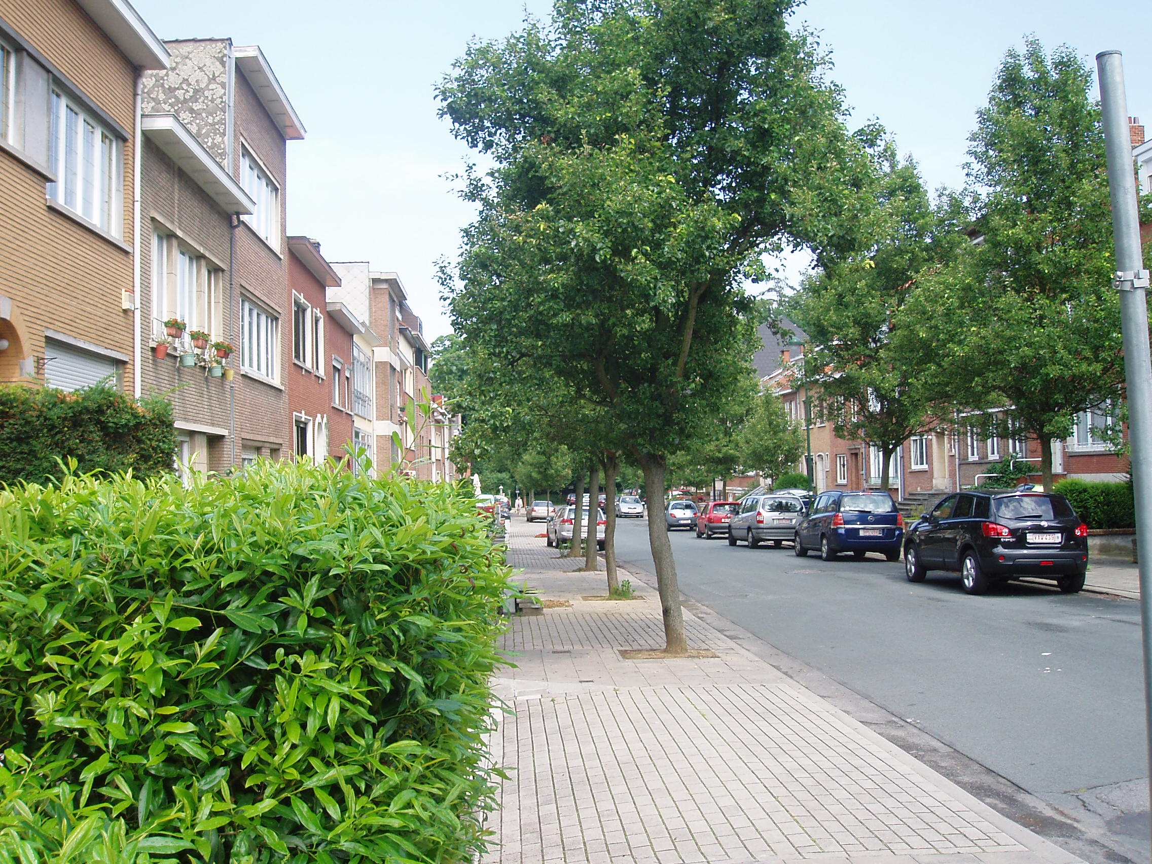 avenue Jolé Auderghem Belgium